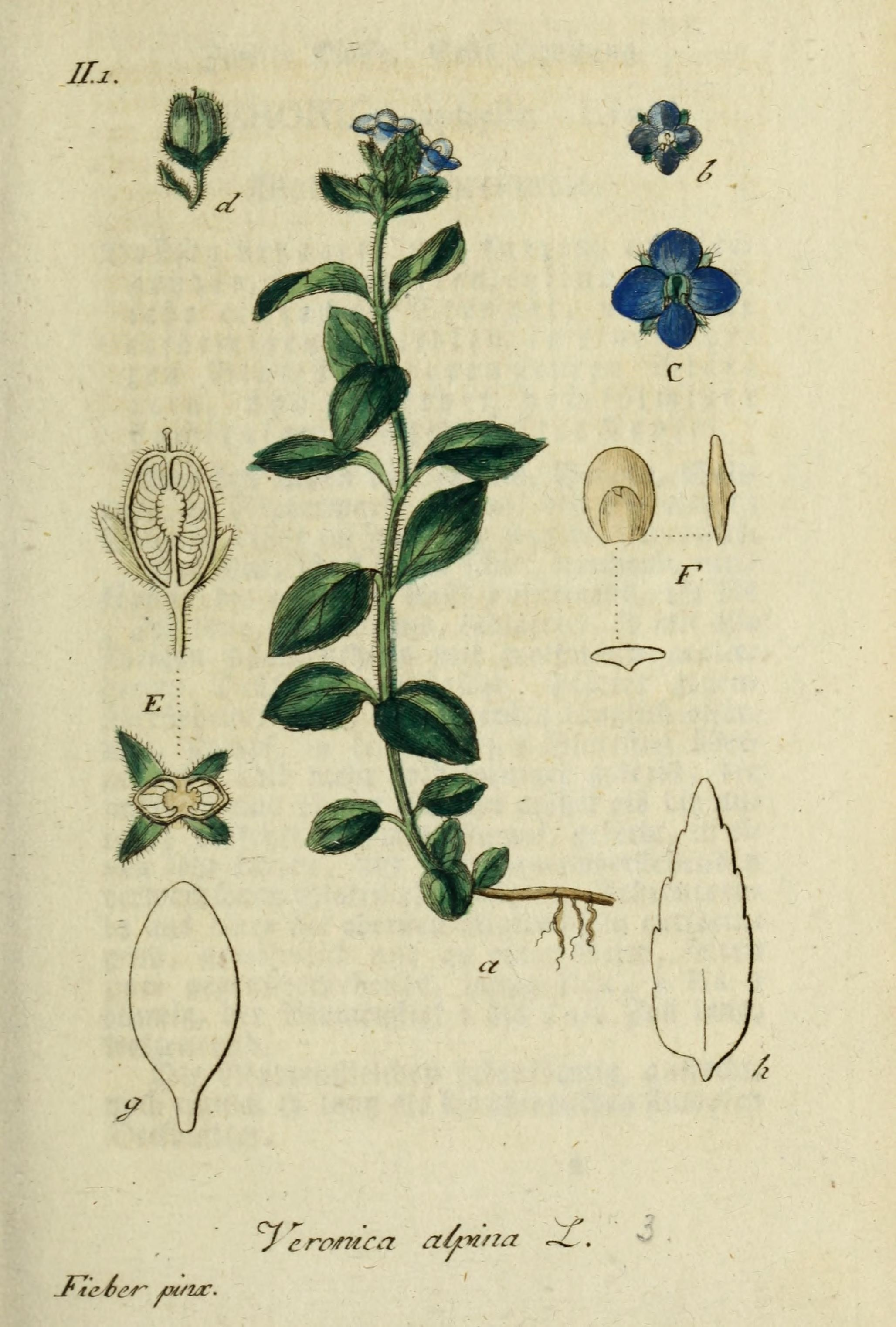 Iii.